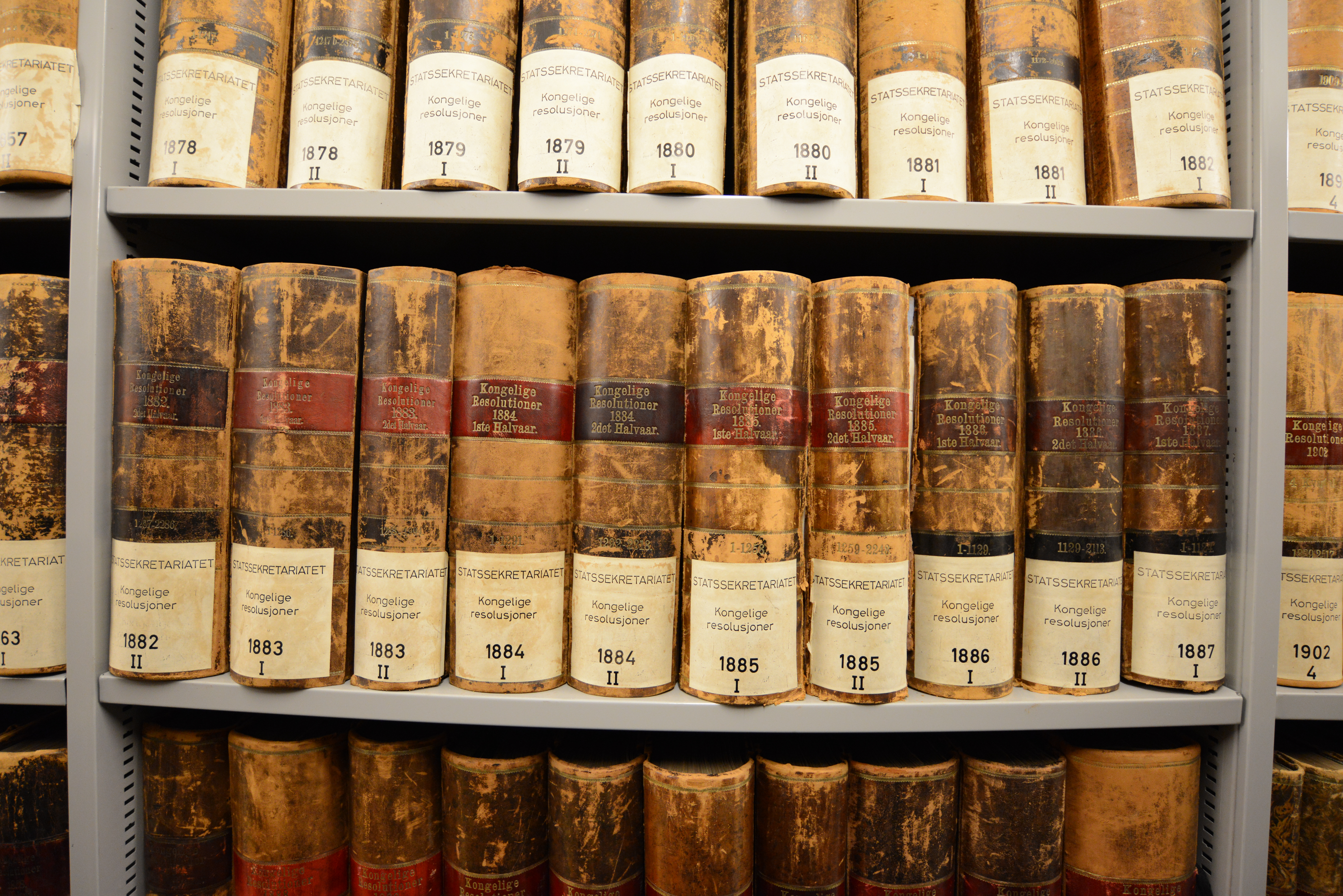 Kongelige resolusjoner ved Riksarkivet.